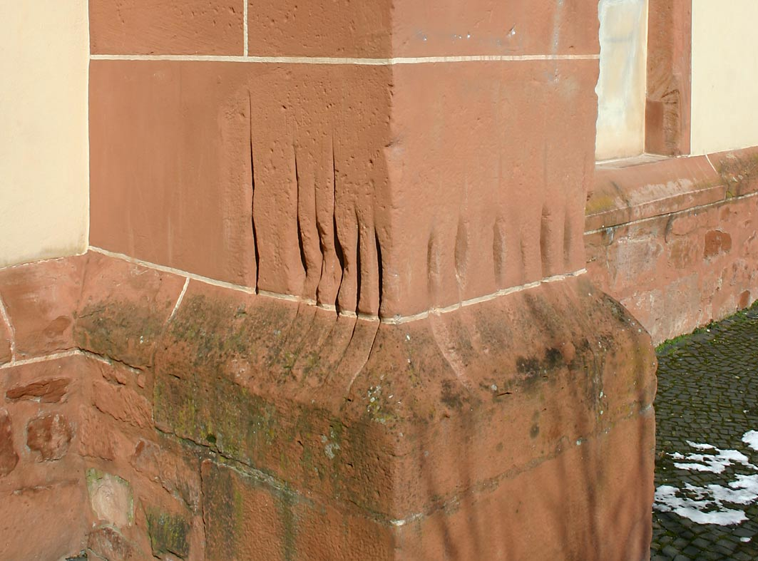 Die Marienkirche in Büdingen, Südseite - Schabemarken der 'Heiligen Frauen'